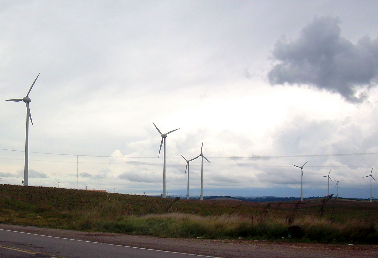 Usinas eólicas de Palmas